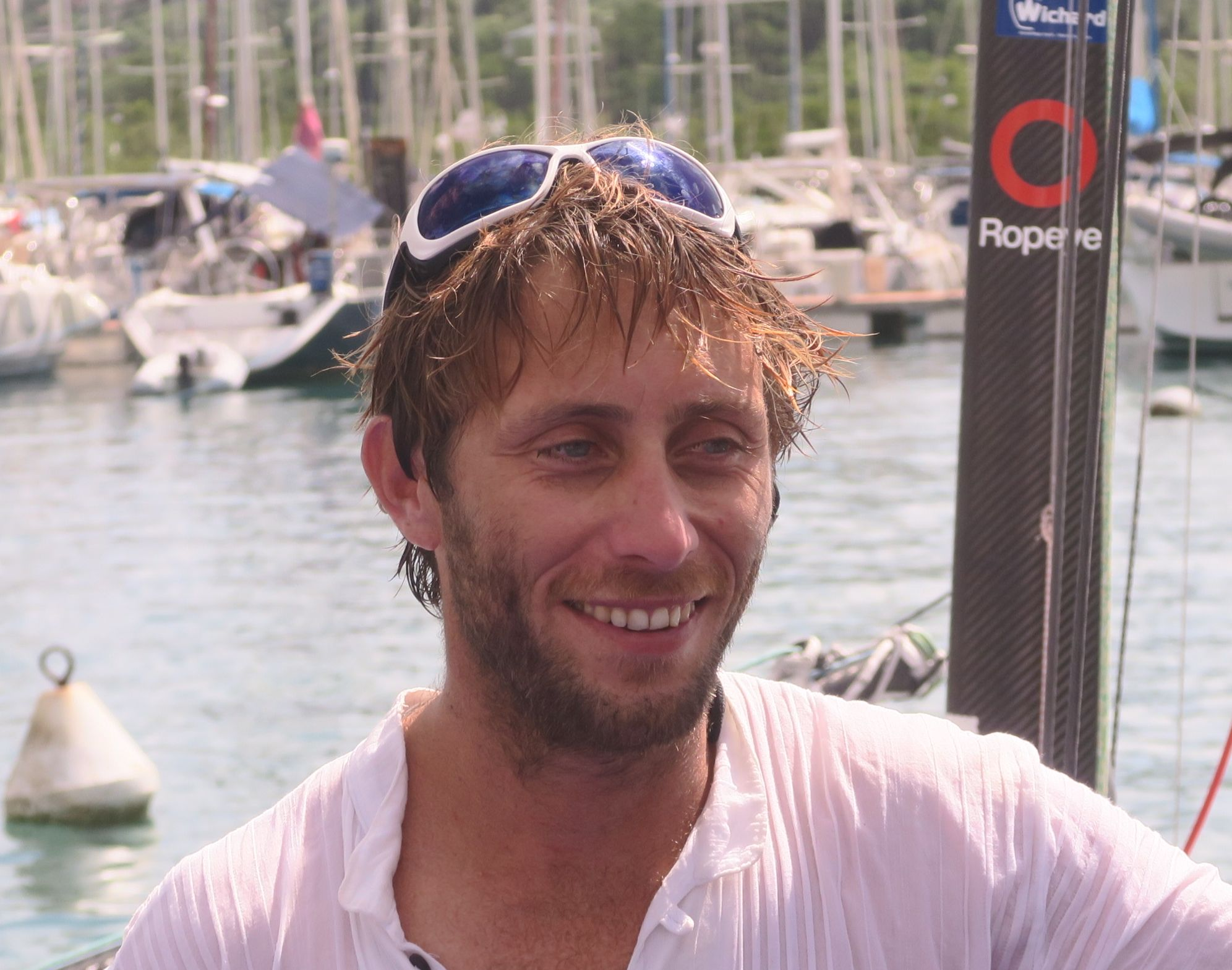 Ian Lipinski à l'arrivée de la deuxième étape de la course au Marin, Martinique